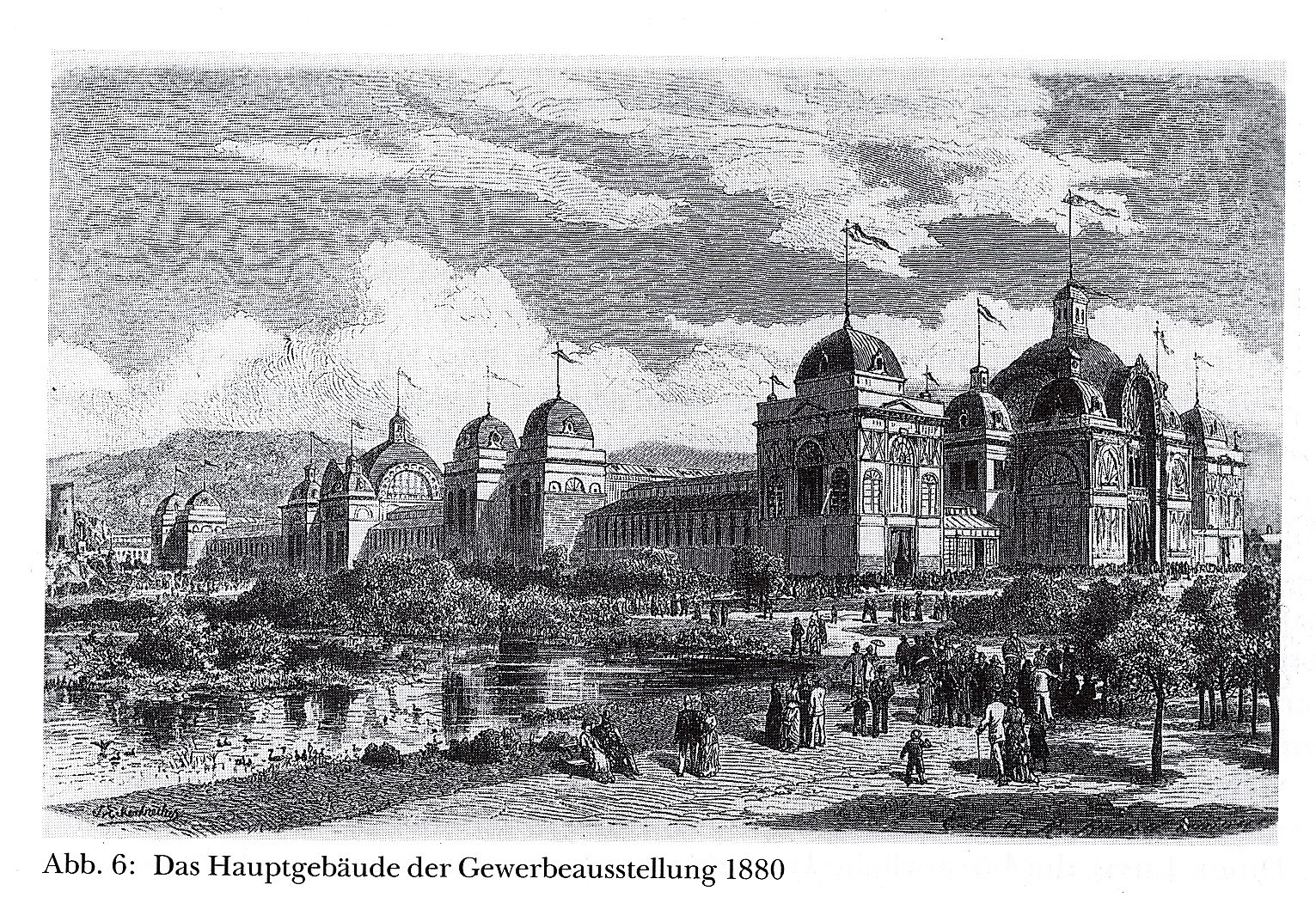 Hauptgebäude für die Gewerbe- und Kunstausstellung 1880 im Bereich des ehemaligen Zoologischen Gartens in Düsseldorf, Entwurf Boldt & Frings